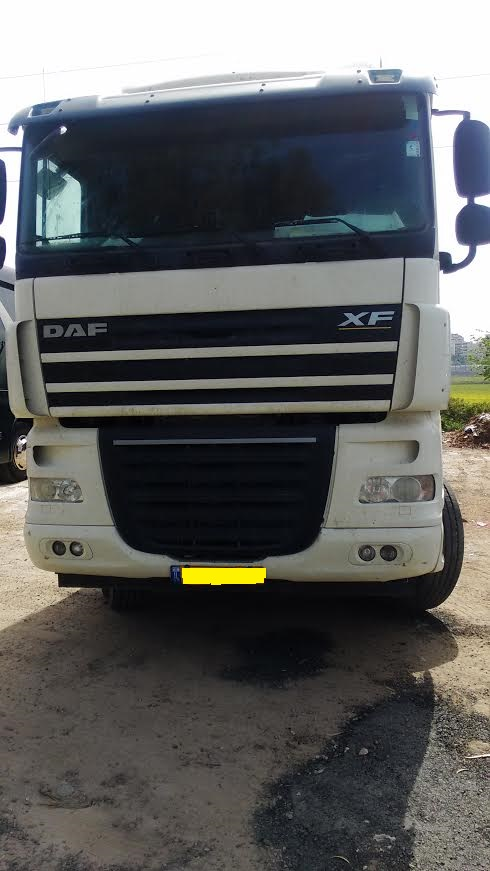 משאית דף